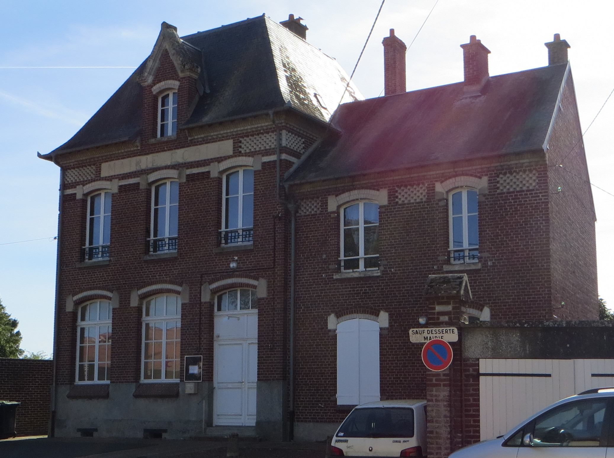 Vue générale de la mairie